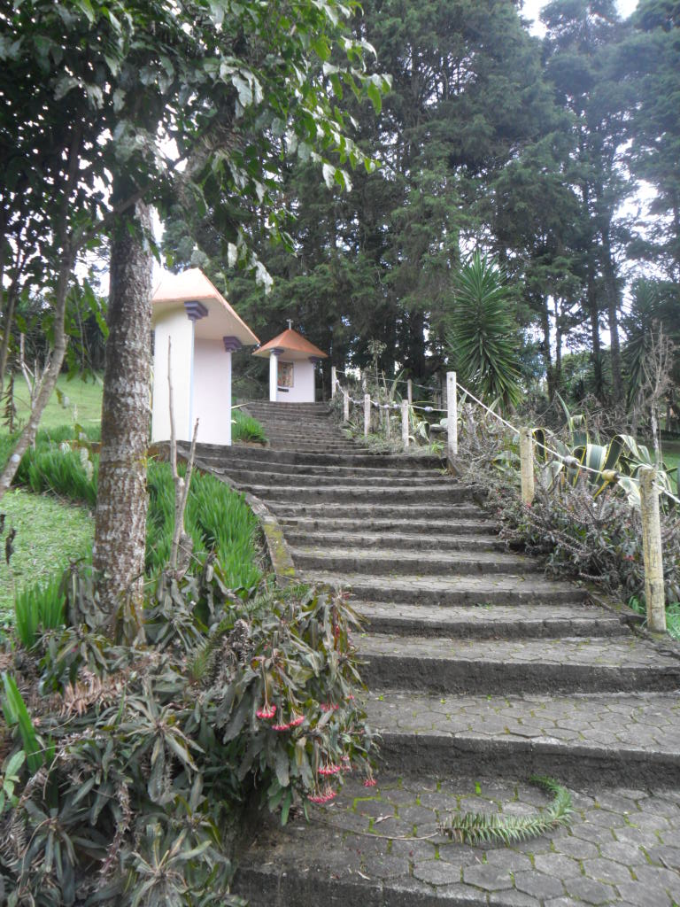 Capelinhas do Rosário, em Itaiópolis, Santa Catarina